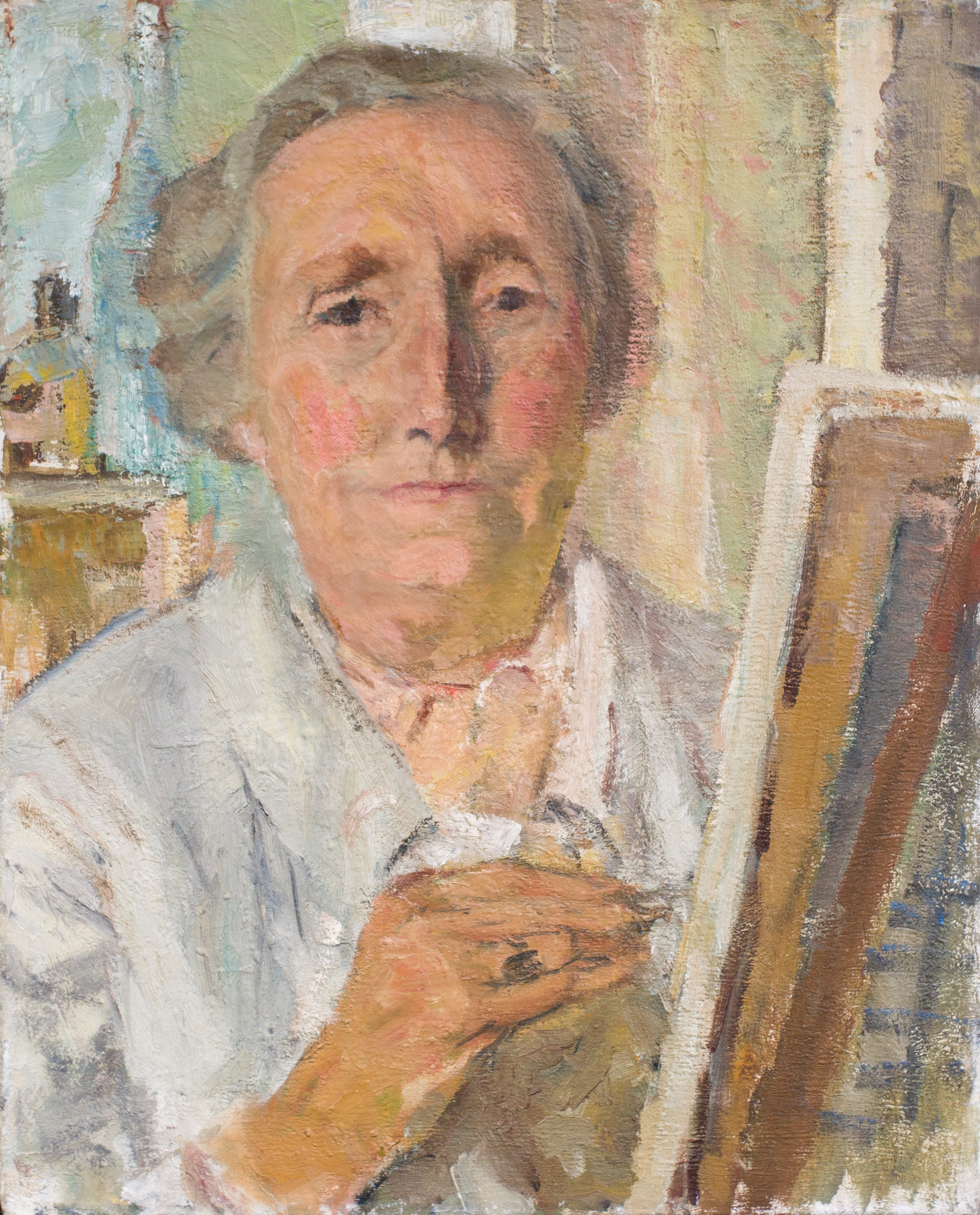 "Selbstbildnis" Öl 1962, Privatbesitz, Foto: Victor Ströver